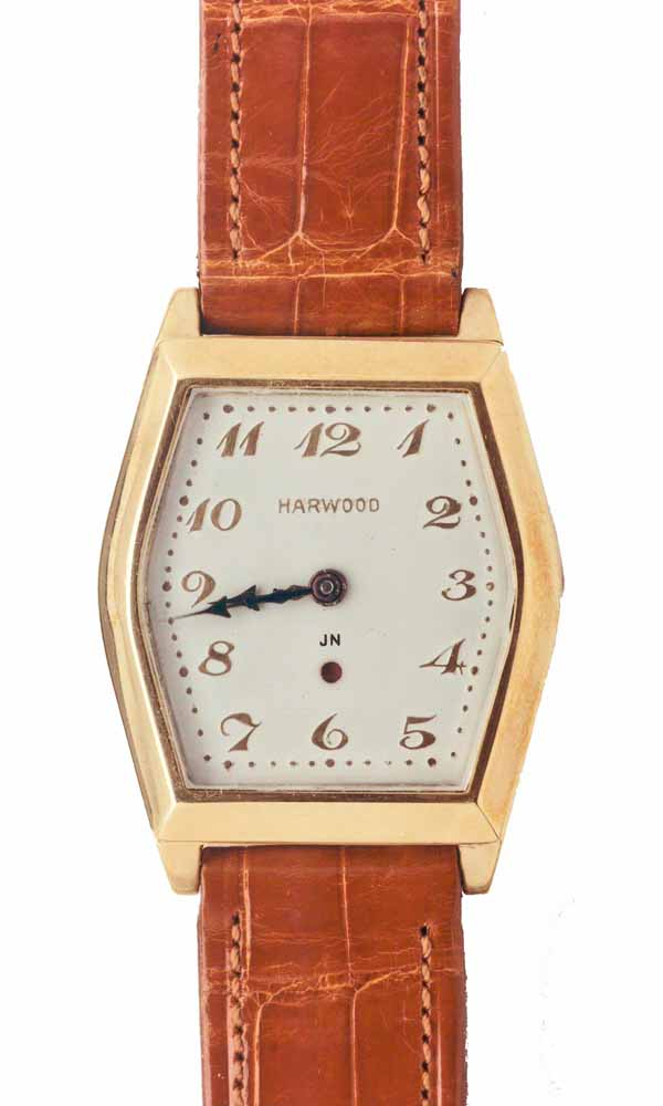 Erste Serien-Armbanduhr mit automatischem Aufzug, Harwood, Schweiz, ab 1929 (Deutsches Uhrenmuseum, Inv. 47-3543)